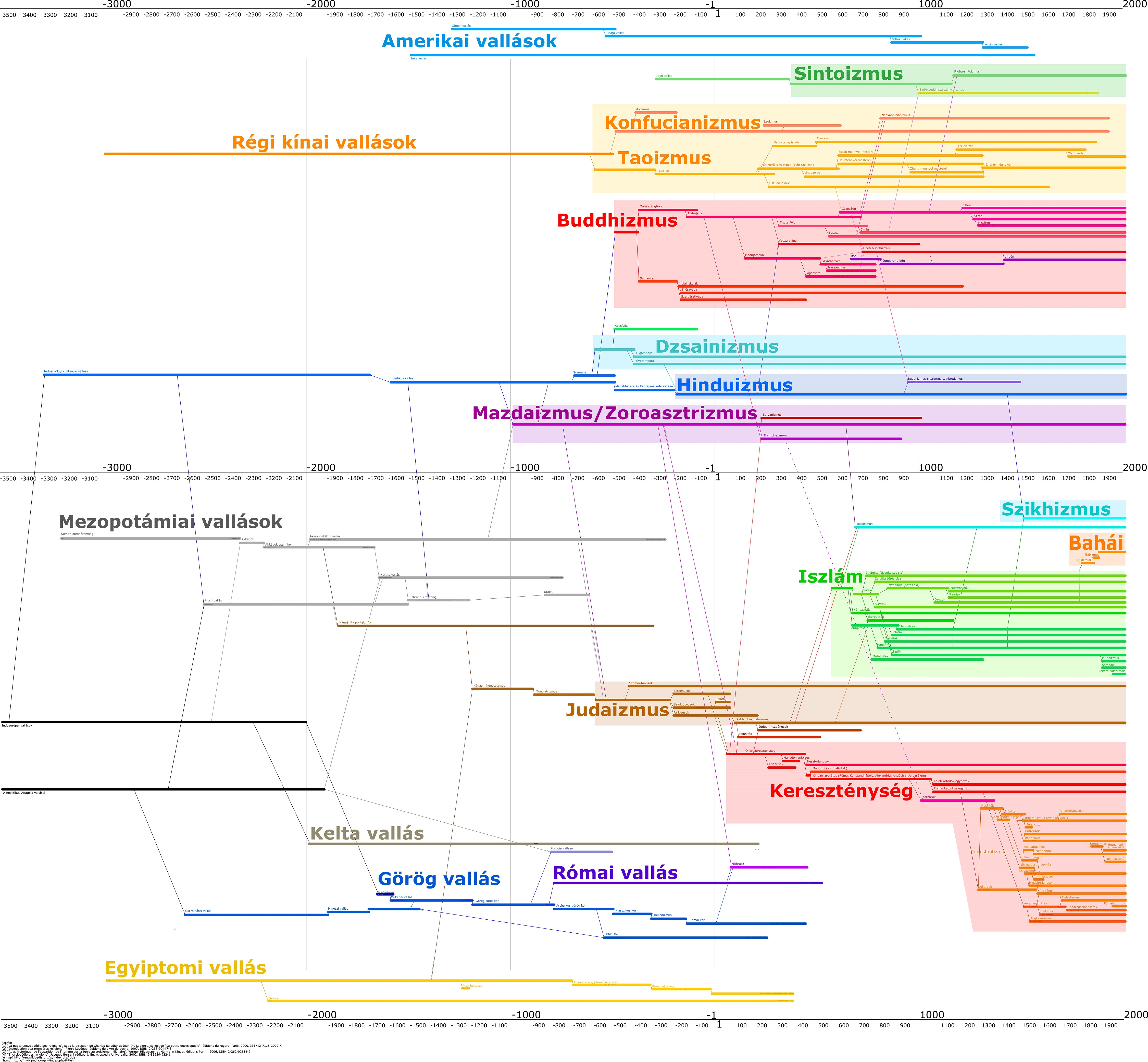 A vallás kronológiája